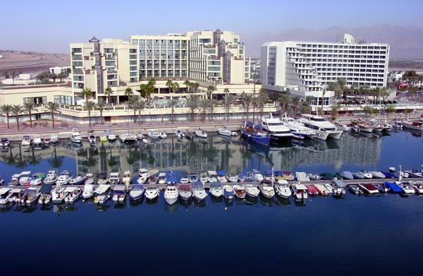 Еилат, Израел, јануар 2004. (слику направио Борис Малагурски) ☺ Ову слику је направио Борис Малагурски.